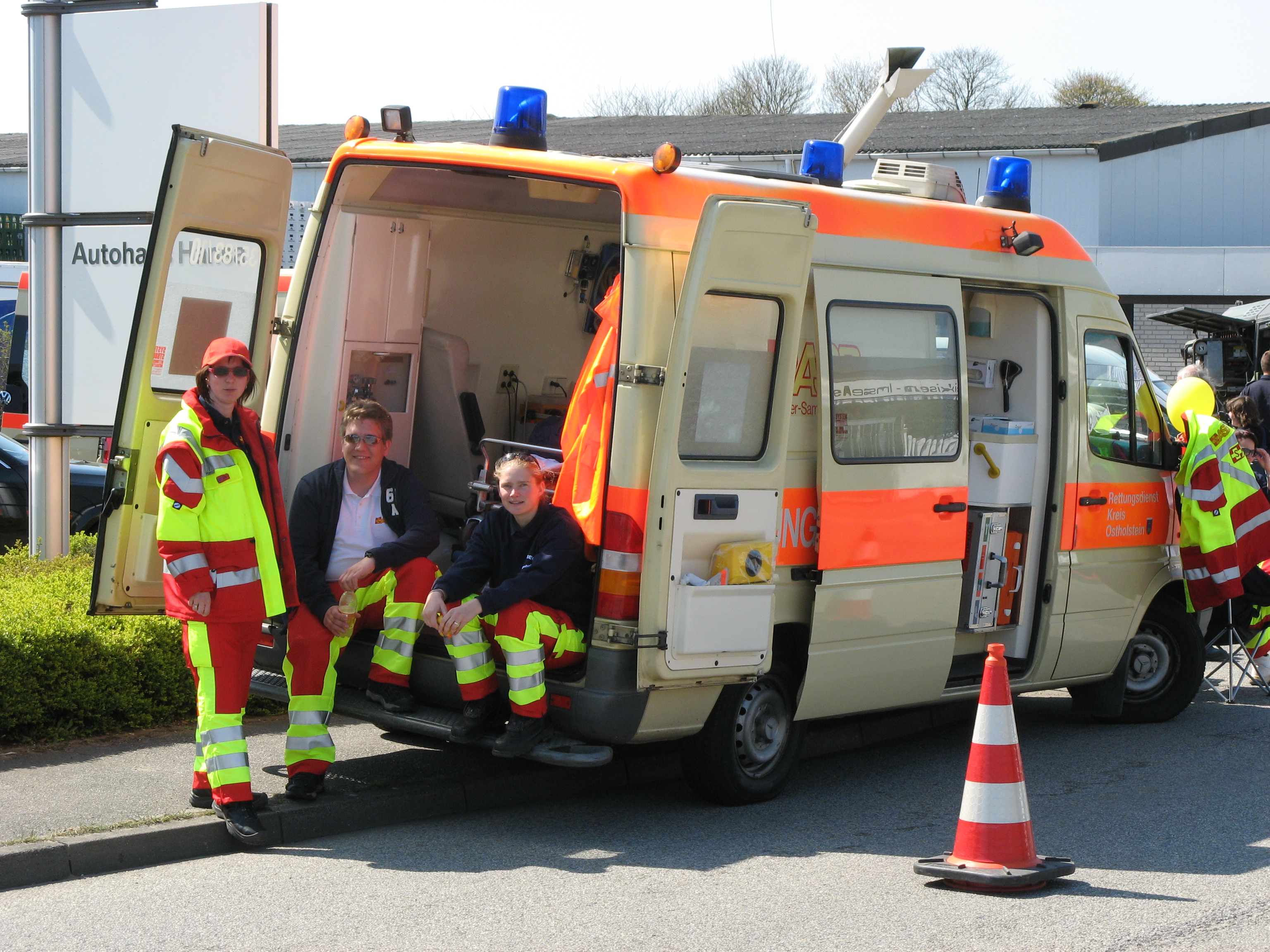 Rettungswagen (RTW) des Arbeiter-Samariter-Bund Deutschland e.V. (ASB) auf dem Sicherheitstag 2009 in Oldenburg in Holstein